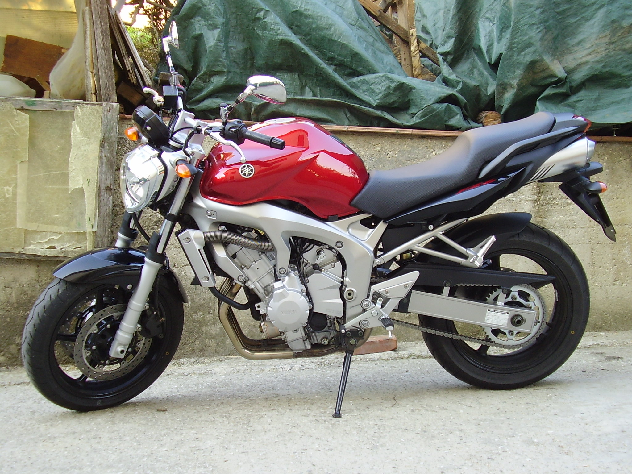 Yamaha FZ6 - La mia moto